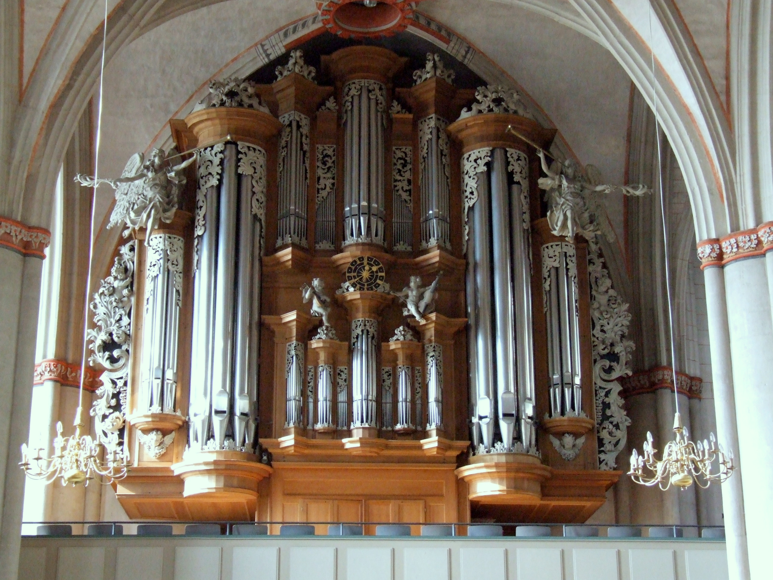 Orgel in der Lutherischen Pfarrkirche in Marburg.